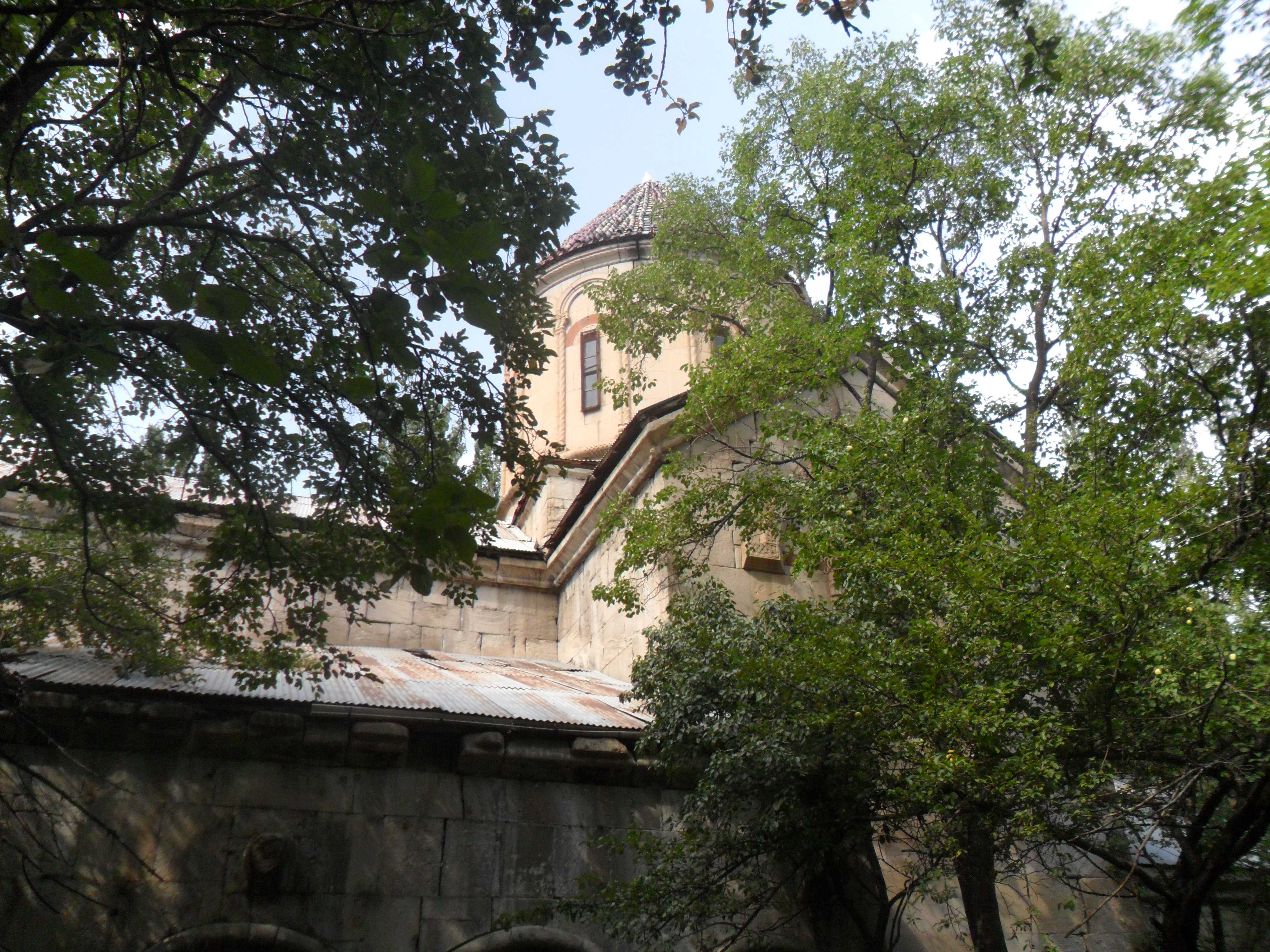 Խախուի վանքը